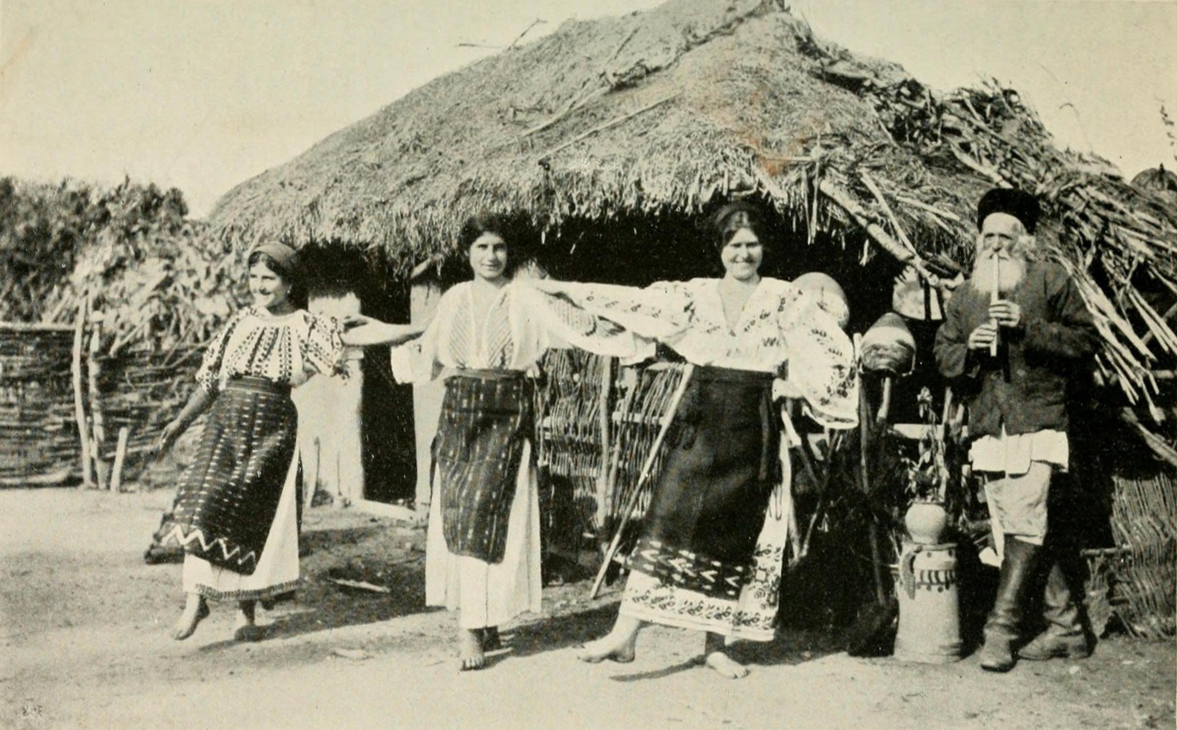 Tarani dansand hora